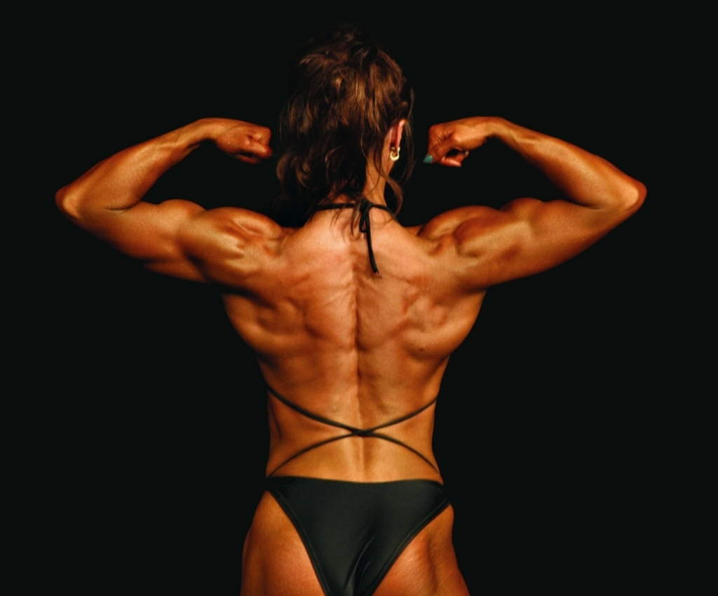 Mujer culturista mostrando la musculación de la espalda y los brazos